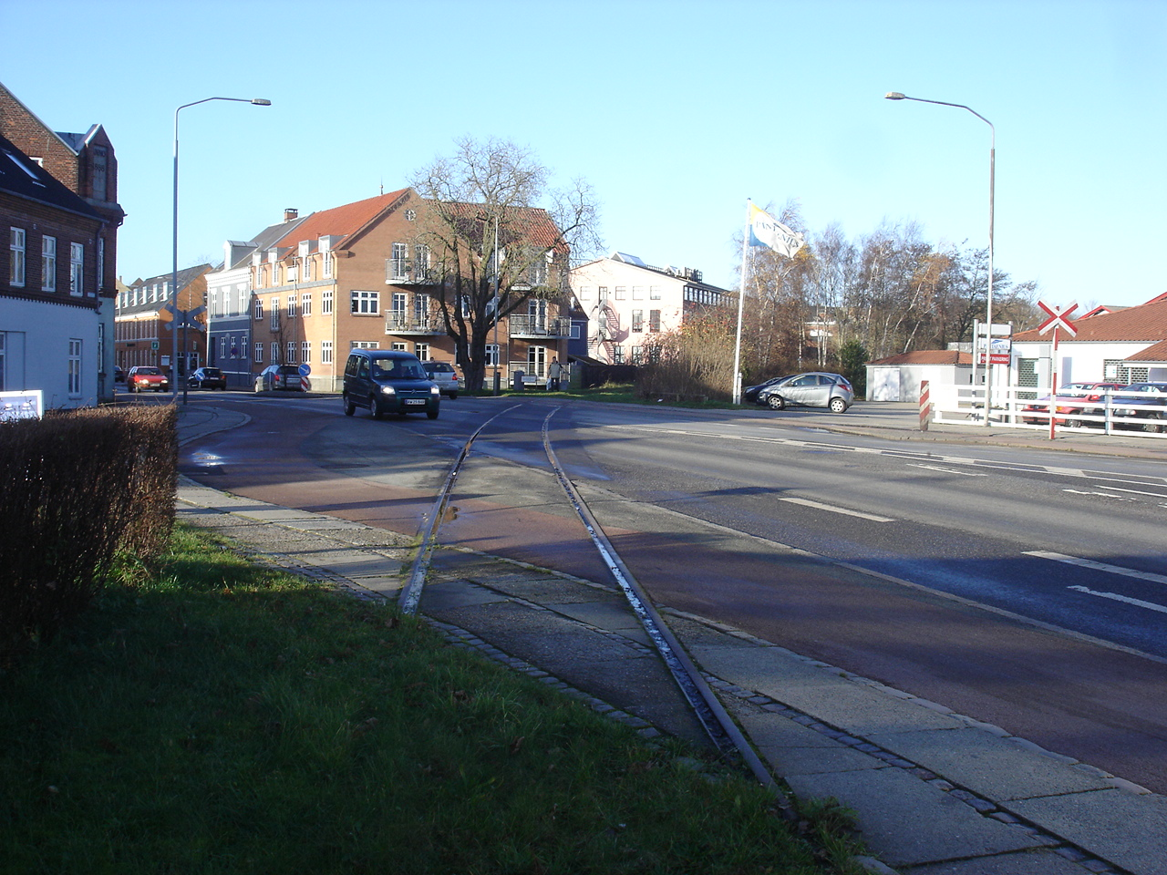 Skive Havnebane krydser Viborgvej